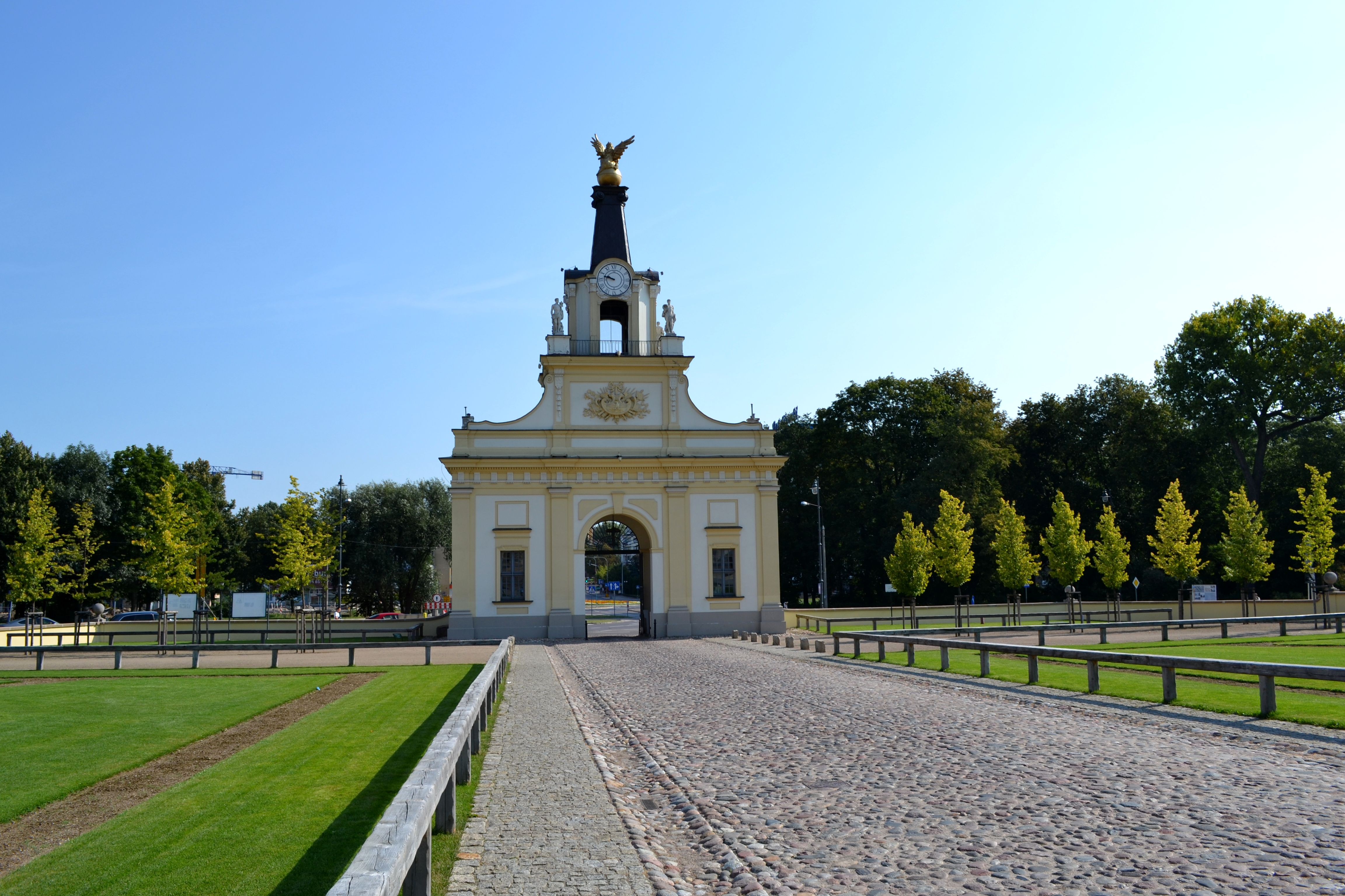 Białystok, zespół pałacowy Branickich